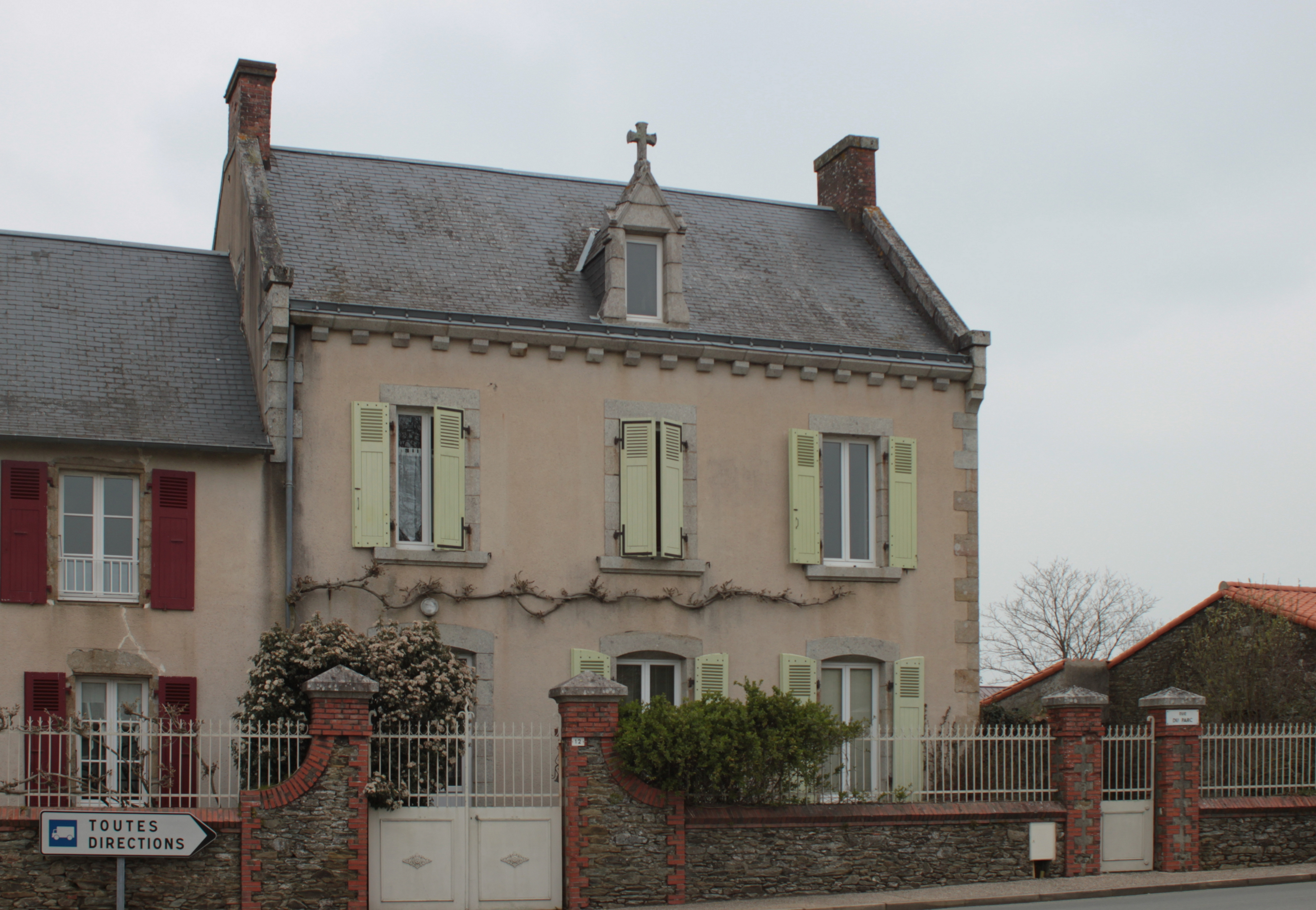 Presbytère, Fr-85-Rabatelière.